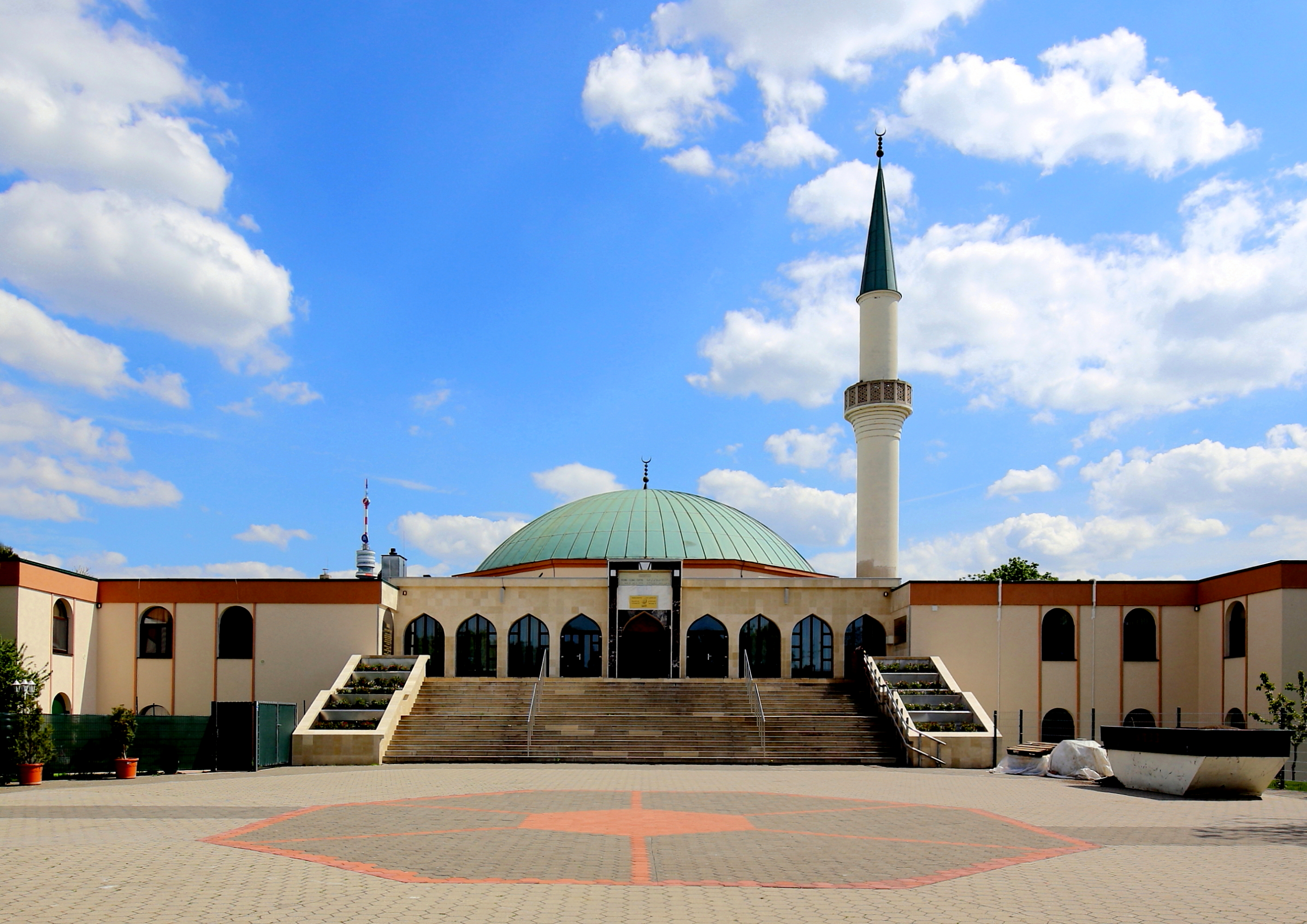 Hauptportal des Islamischen Zentrum Wien in Bruckhaufen, ein Ortsteil im 21. Wiener Gemeindebezirk Floridsdorf. Die Moschee mit einem 32 m hohem Minarett und einer Kuppel mit rund 20 m Durchmesser wurde von 1975 bis 1979 von Baumeister Richard Lugner im Auftrag des saudi-arabischen Königs Faisal ibn Abd al-Aziz errichtet.